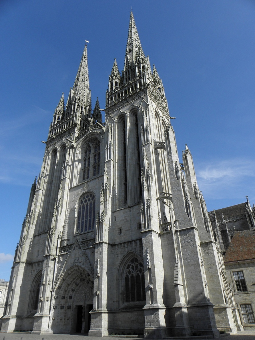 Façade occidentale de la cathédrale Saint-Corentin de Quimper (29).